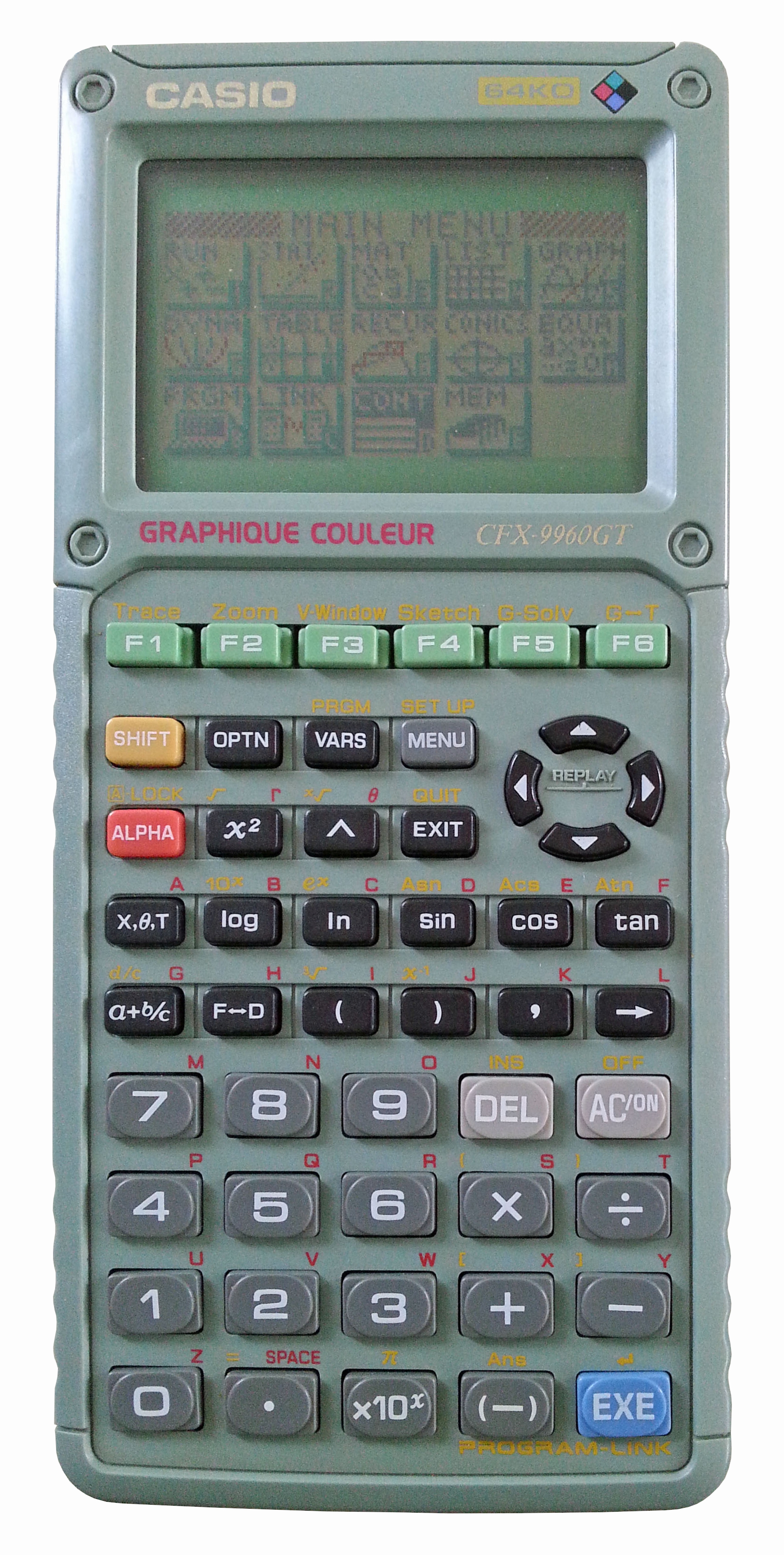 Calculatrice Casio CFX-9960GT